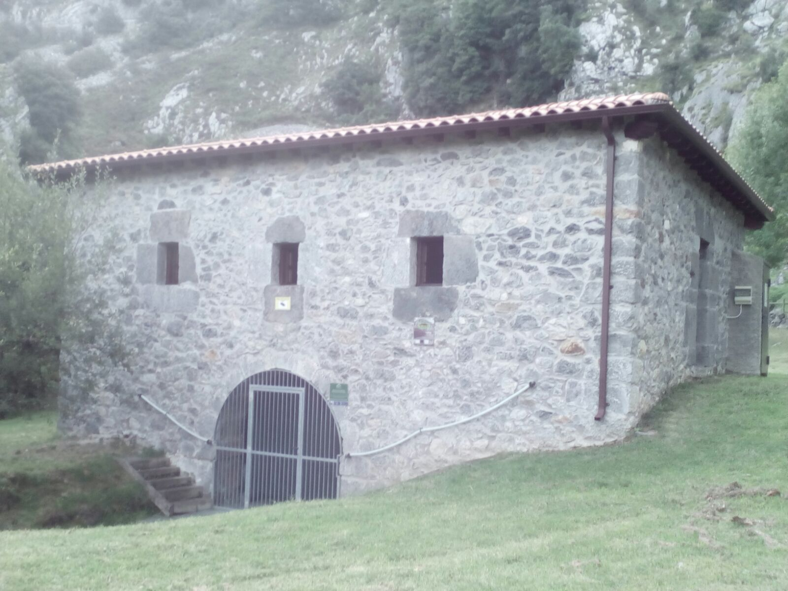 Antiguo molino (actual criadero de truchas) en el nacimiento del Gándara, en Soba (Cantabria).